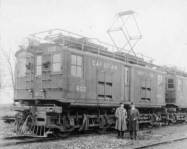 Title / Titre : Canadian Northern Railway electric locomotive no. 602 used in Mount Royal Tunnel and later became Canadian National Railways engine no. 9102 / La locomotive électrique no 602 de la société Canadian Northern Railway en service sur la ligne de chemin de fer du mont Royal; elle deviendra ensuite la locomotive no 9012. Creator(s) / Créateur(s) : Unknown / Inconnu Date(s) : 1914 Reference No. / Numéro de référence : MIKAN 3228803 Location / Lieu : Montreal, Quebec, Canada / Montréal, Québec, Canada Credit / Mention de source : Library and Archives Canada, PA-164733 / Bibliothèque et Archives Canada, PA-164733